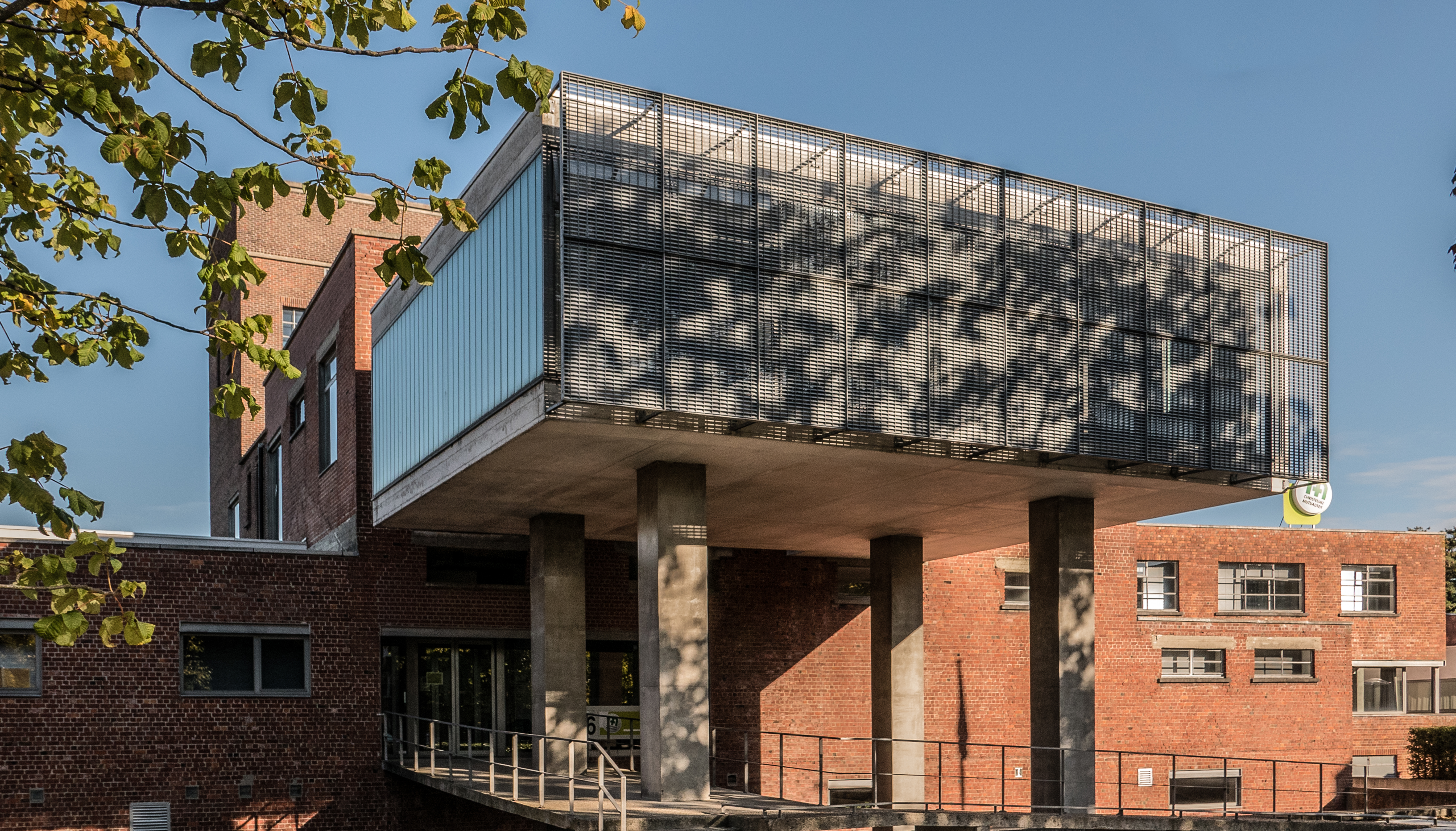 Opmerkelijke architectuur van de hand van architect Stéphane Beel. De verbouwing van de oude Stassano melkerij